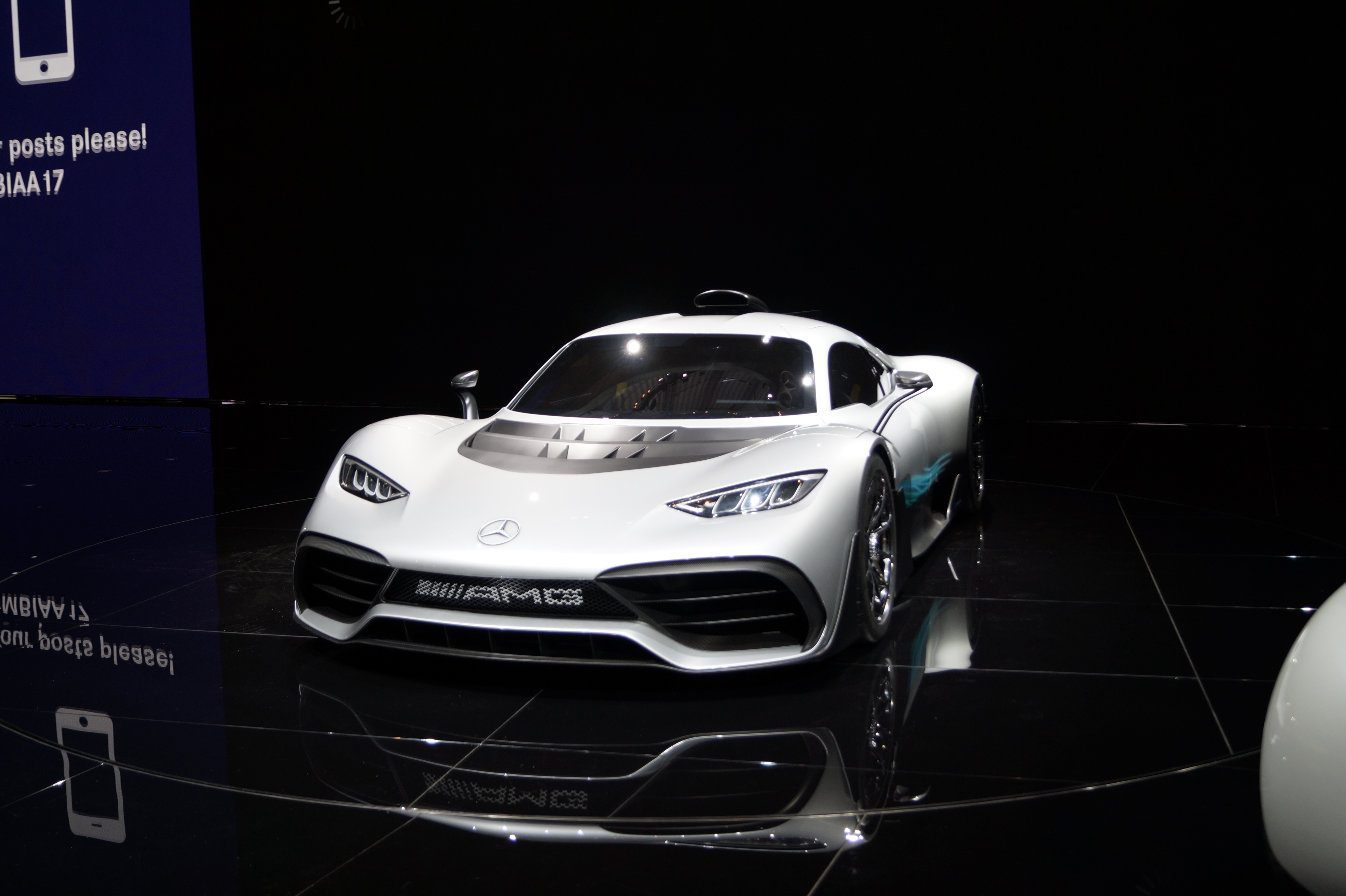 AMG at IAA 2017